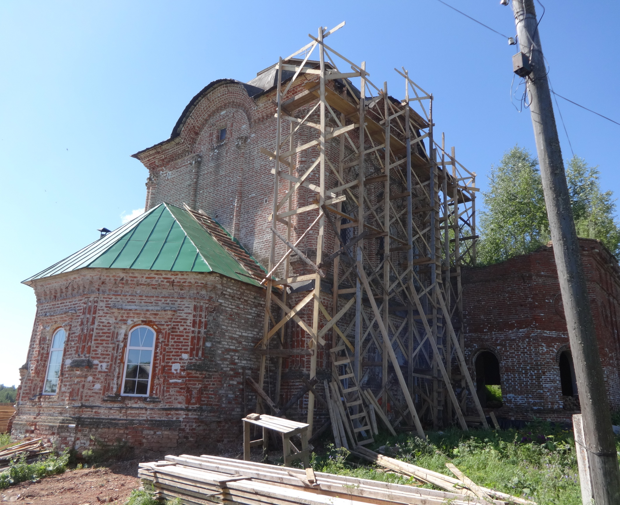 Спасская церковь Совье реконструкция 2018 год